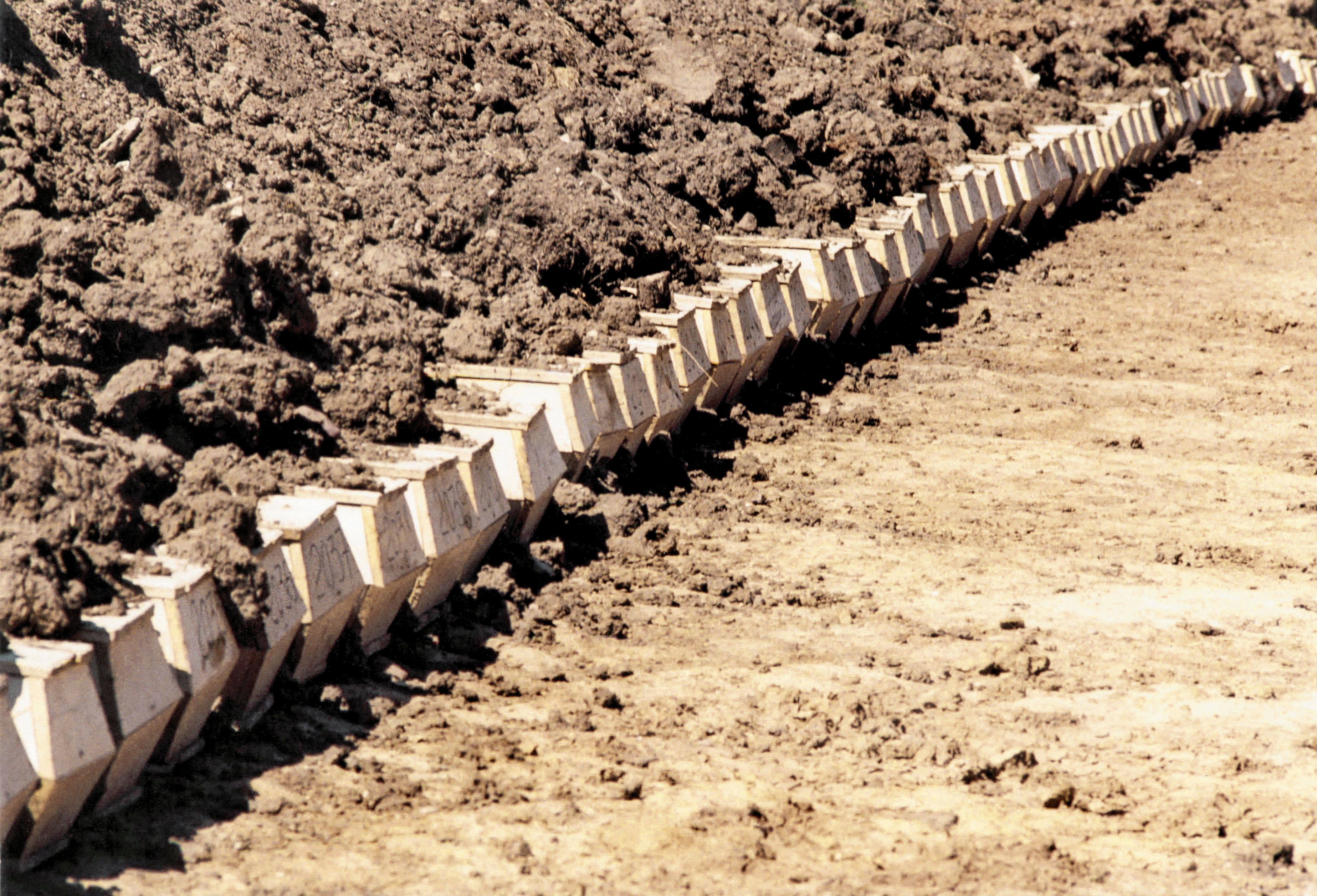 Insterburg, nördliches ehemaliges Ostpreußen: Offenes Massengrab auf einem vom Volksbund Deutsche Kriegsgräberfürsorge gerade neu angelegten Deutschen Soldatenfriedhof Insterburg.